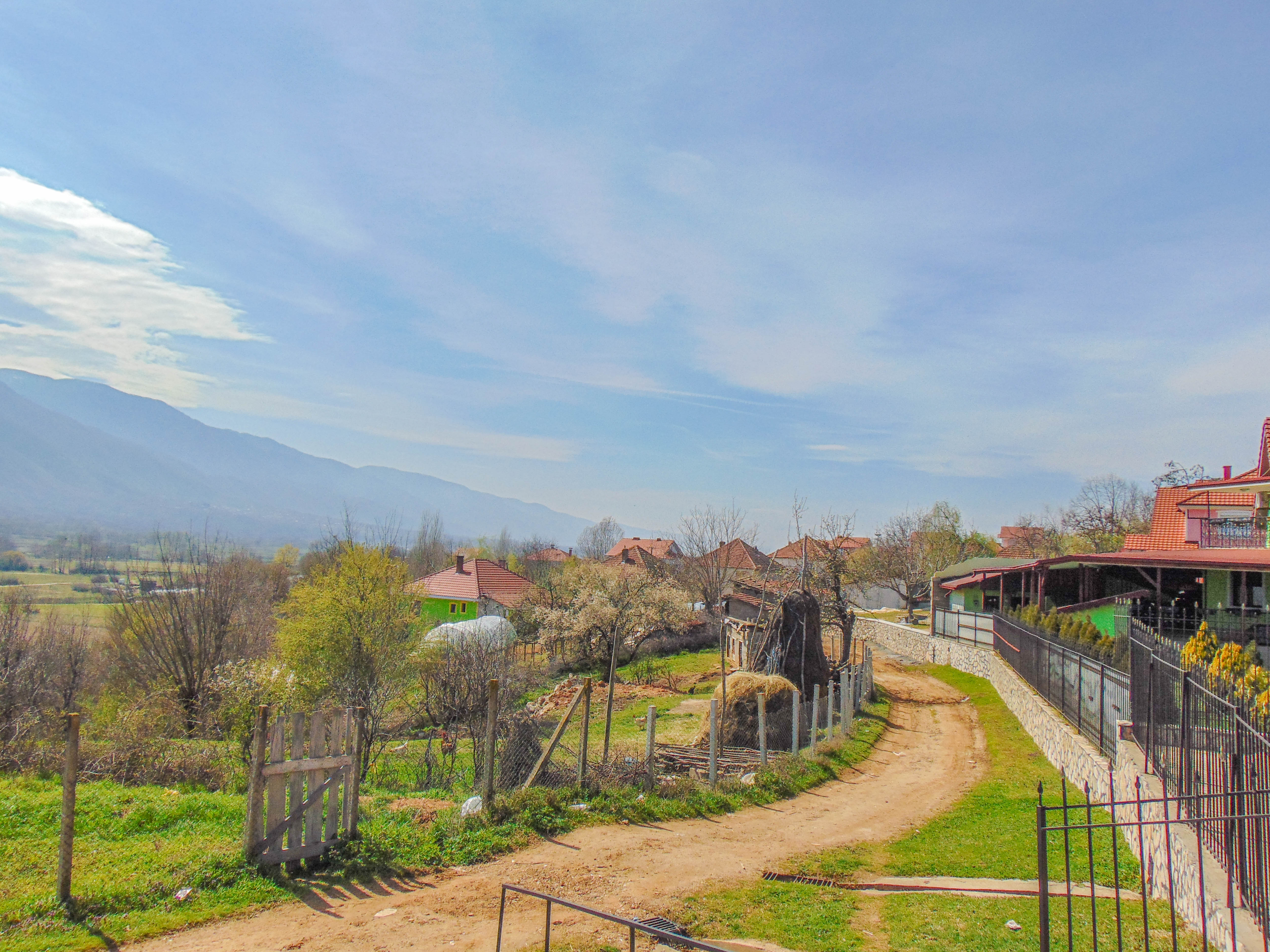 Самоилово